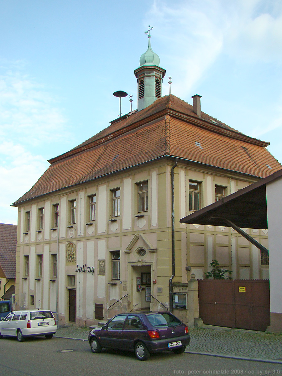 Rathaus in Kraichtal-Gochsheim